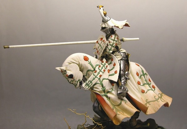 Jean de Crequi cavaliere del Toson d'oro